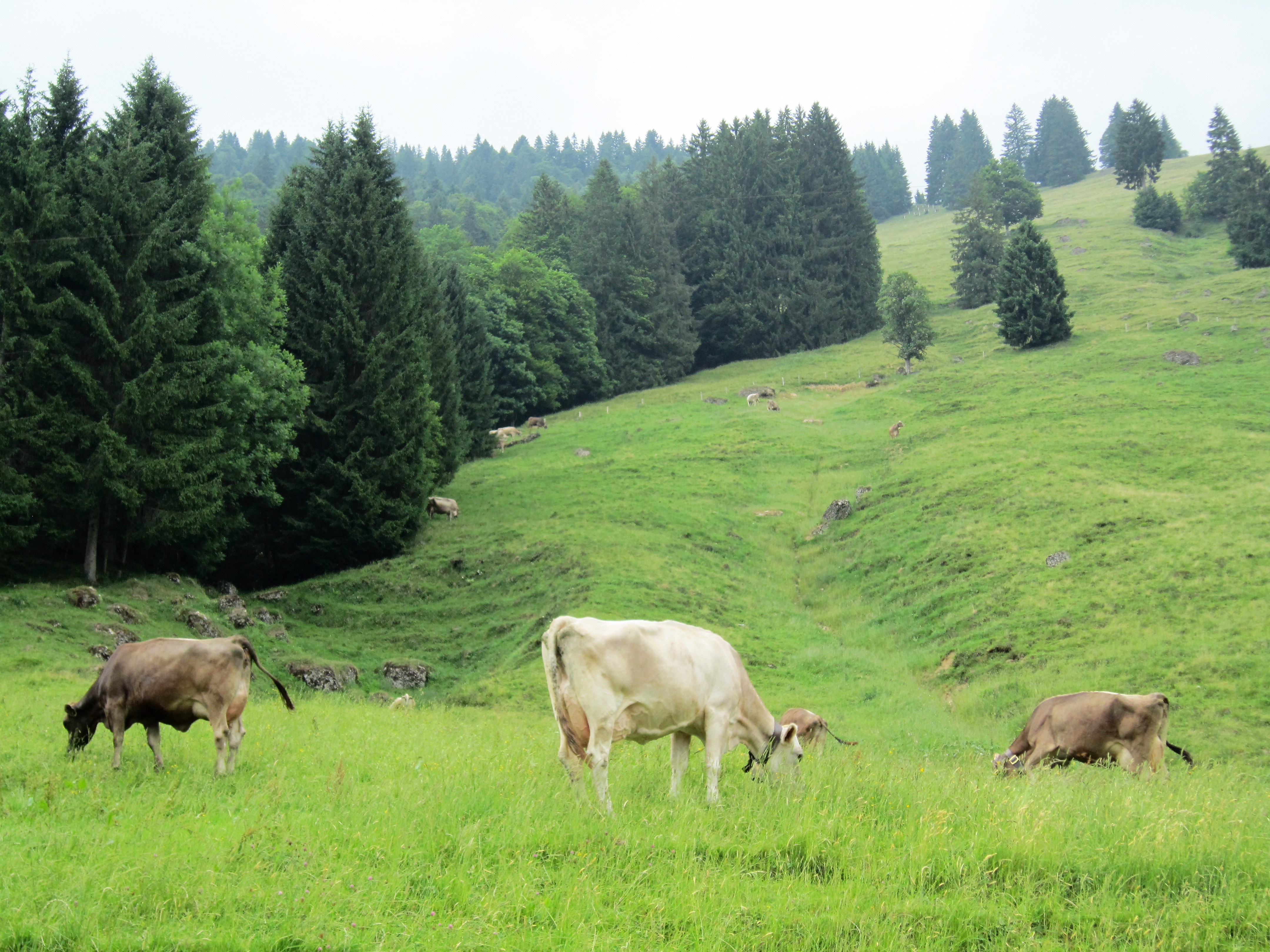 Grasende Rinder am Berghang nördlich der Riederbergpass-Straße